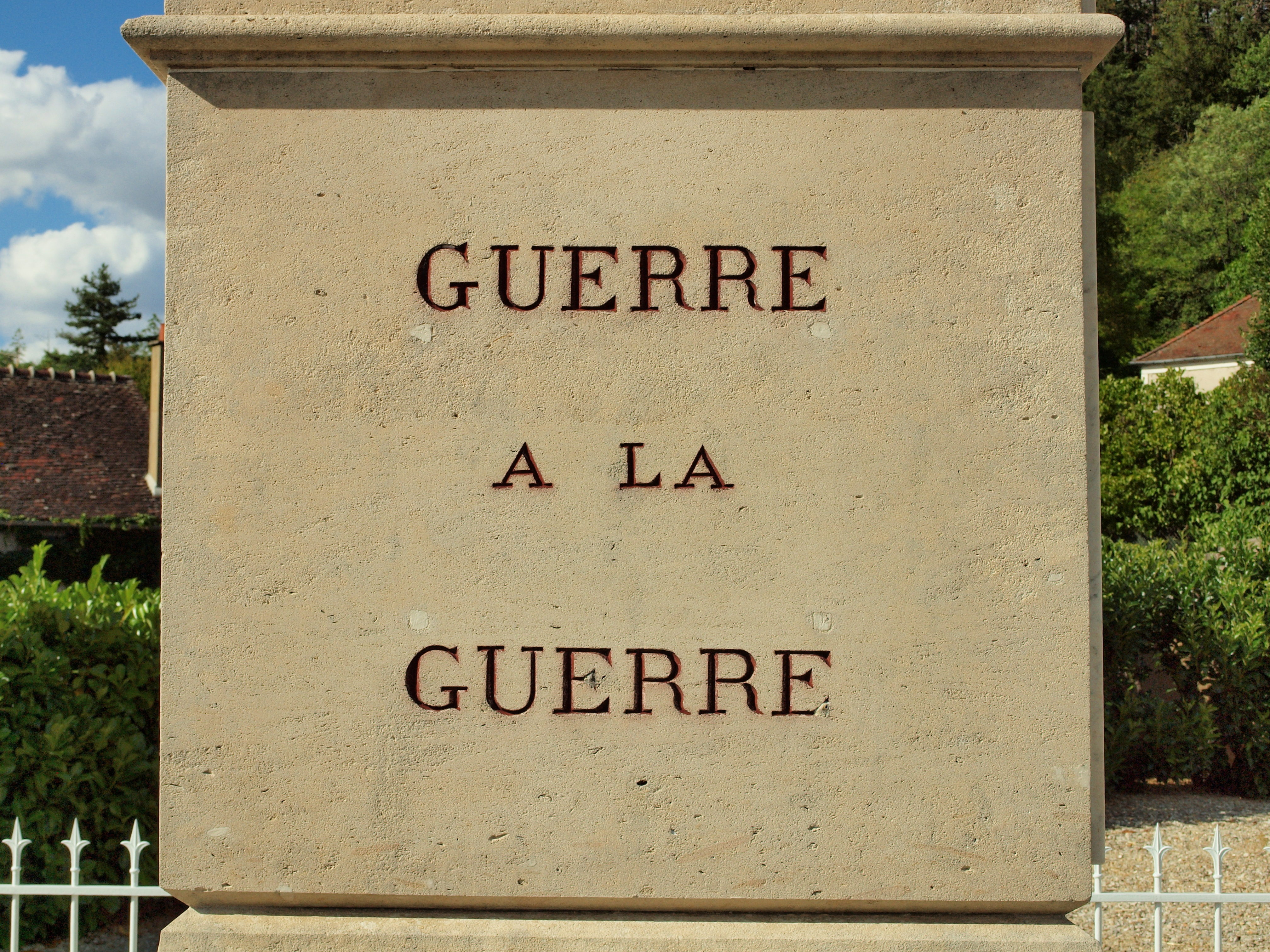 Monument aux morts de Gy-l'Évêque (Yonne, France)